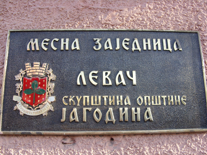 Месна заједница Левач, у Јагодини